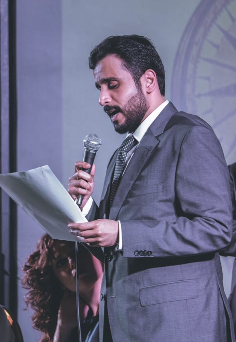 مشعل الزعبي